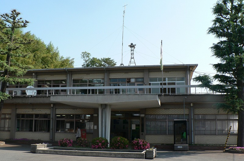 Chihaya-akasaka village office,Osaka,Japan （千早赤阪村役場）